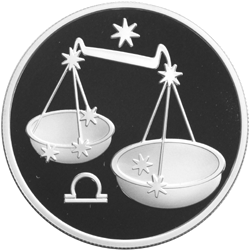 Монета Банка России — Весы 2 рубля 2002 реверс